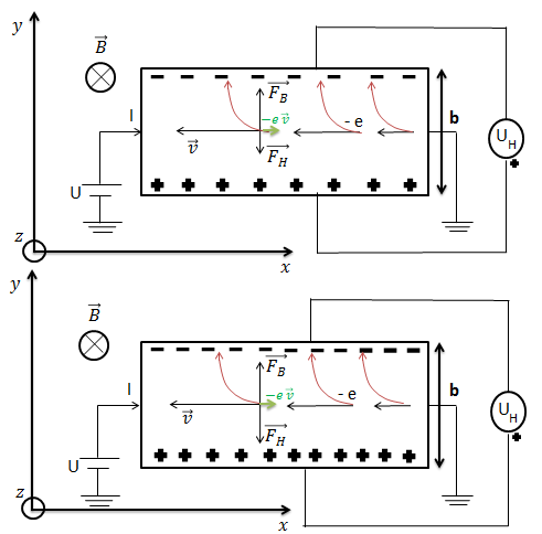 Soumis à un champ magnétique et à un champ électrique, les porteurs dans un métal vont avoir tendance à dévier leur trajectoire, ce qui va avoir pour conséquence de créer une force de Hall s'opposant à la force due au champ magnétique